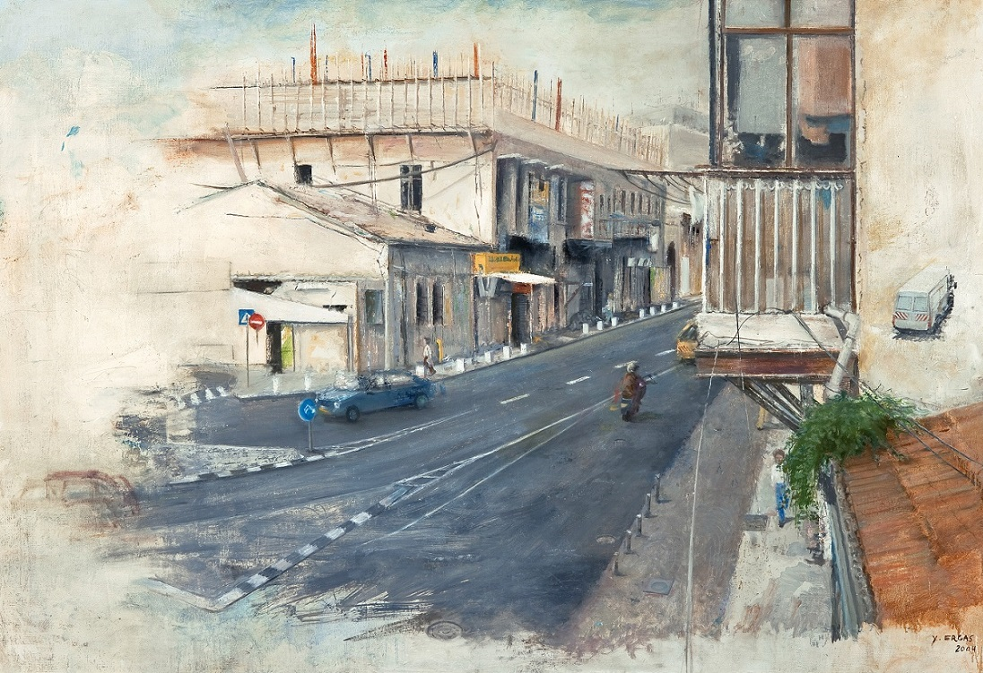 מעלה הרחוב, 2005 שמן על בד, רוחב 130סמ' גלריה אגריפס 12